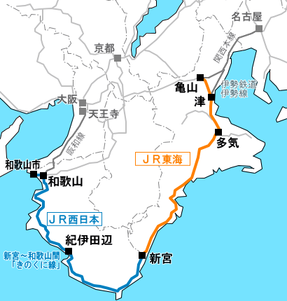 紀勢本線路線図